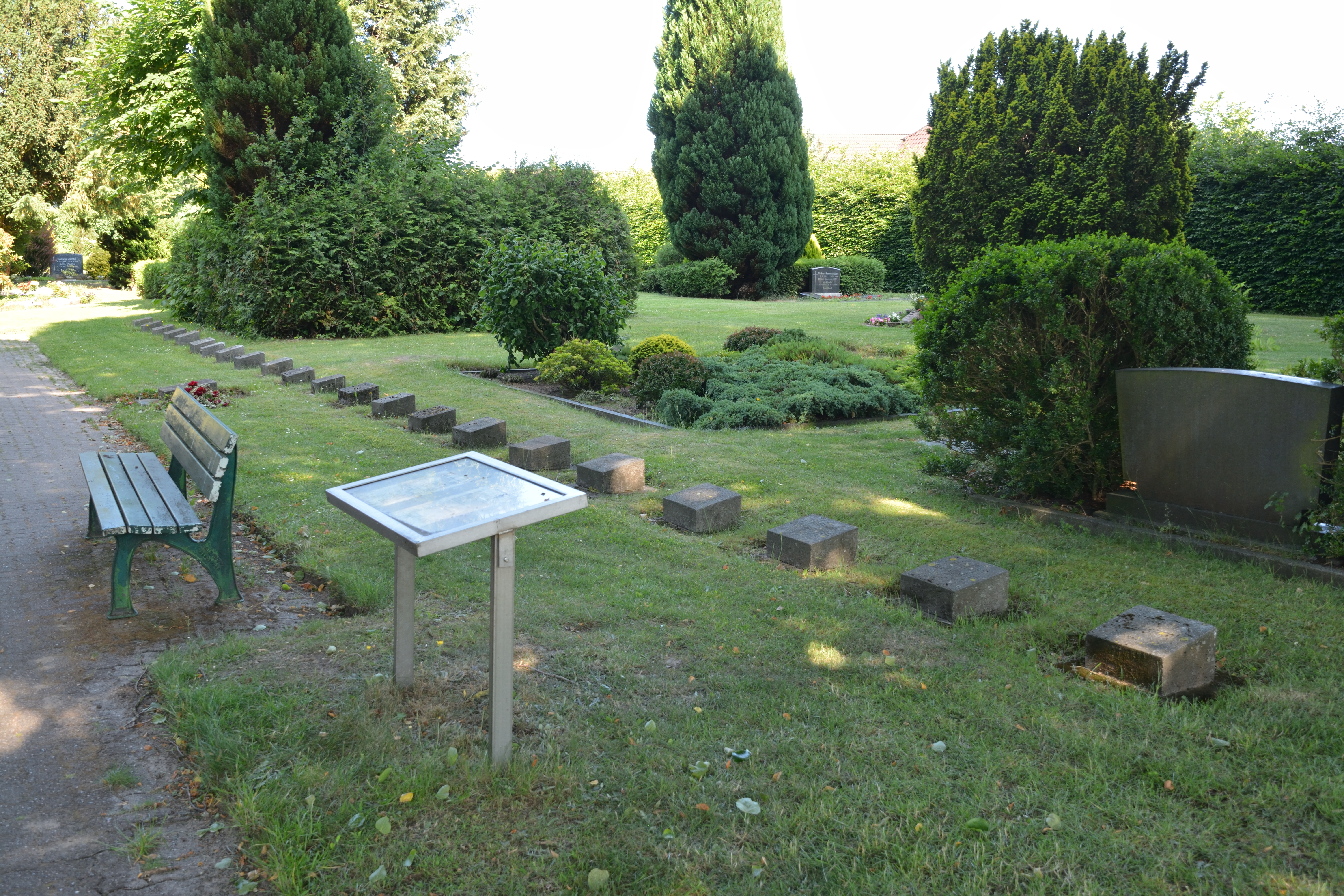 Kriegsgräber auf dem Friedhof von Osterrönfeld